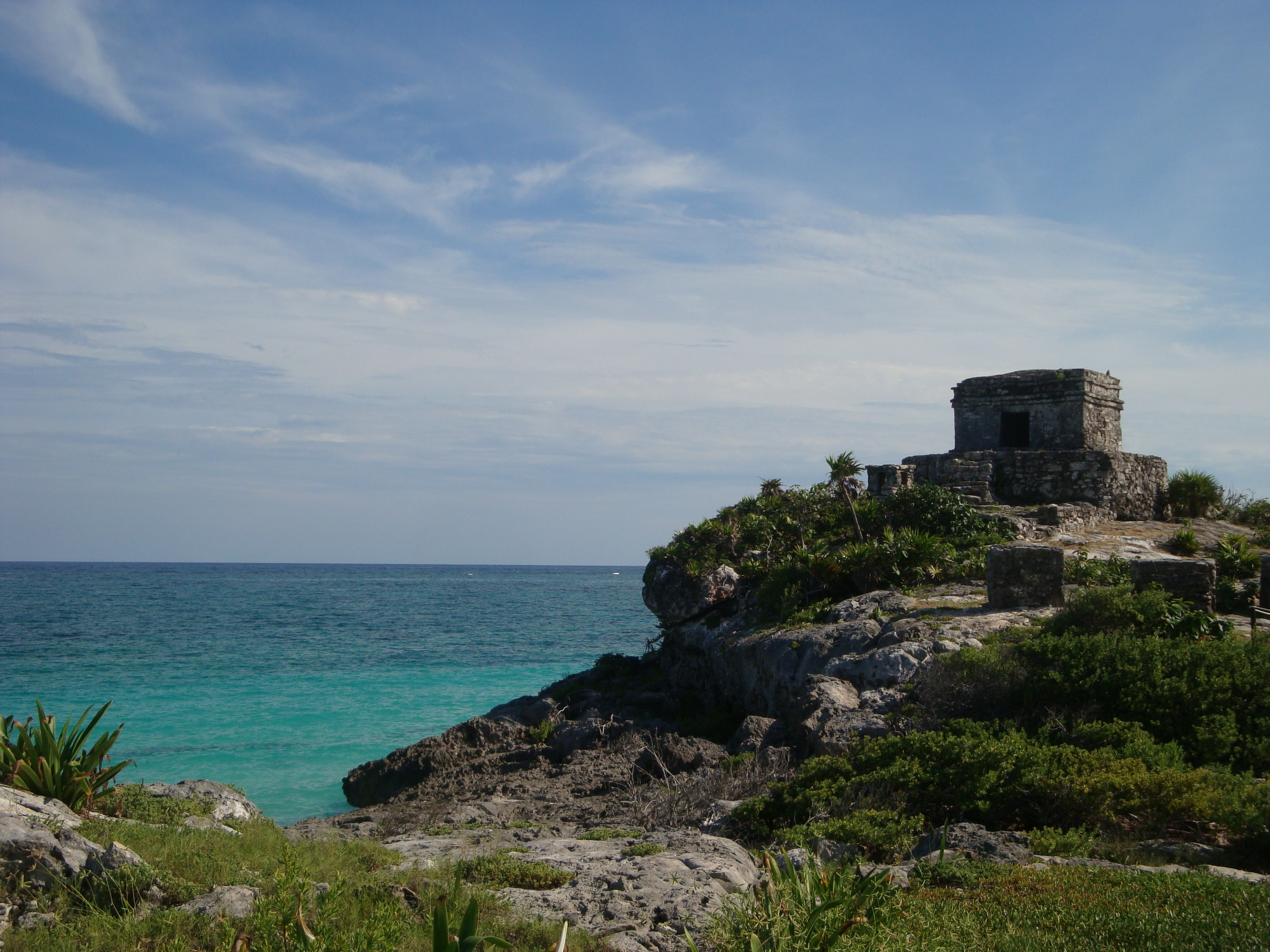 Ruinas de Tulum en el Caribe Mexicano.